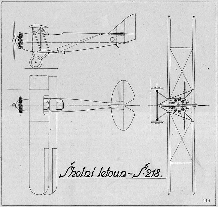 Letov Š-218 (dispozice)